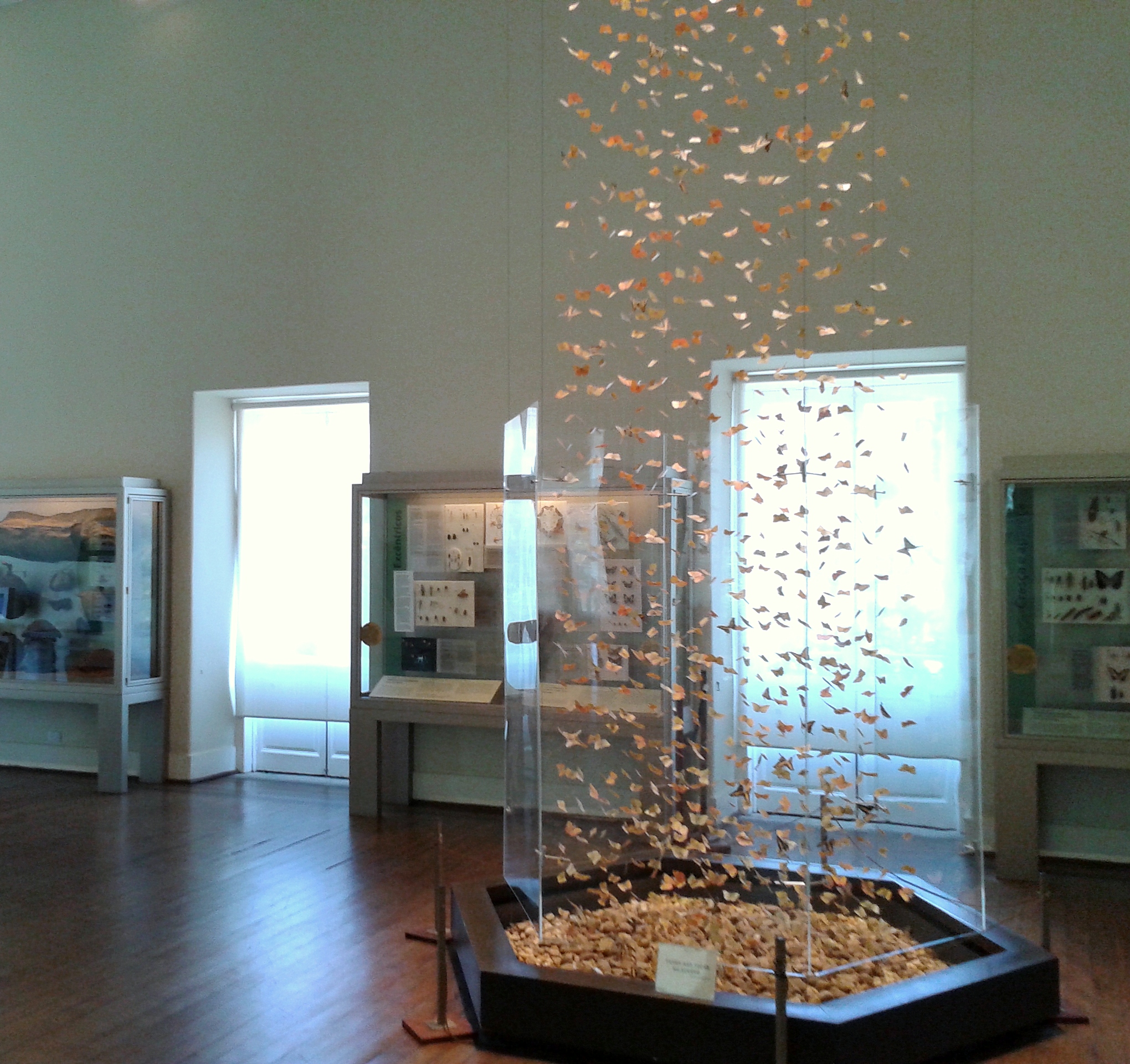 Exposição de Entomologia - Museu Nacional/UFRJ - Rio de Janeiro, Brasil.